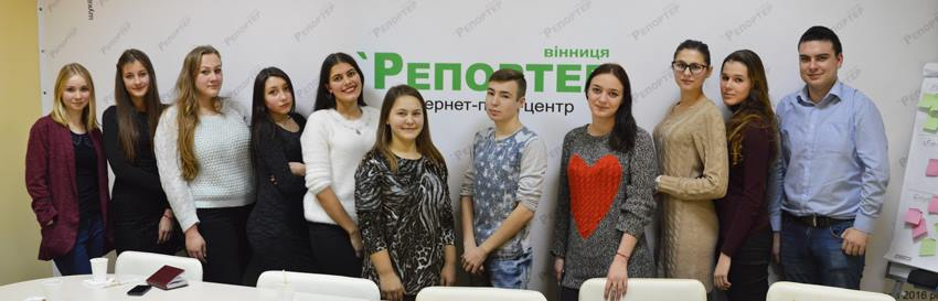 Студентськи медіа проект